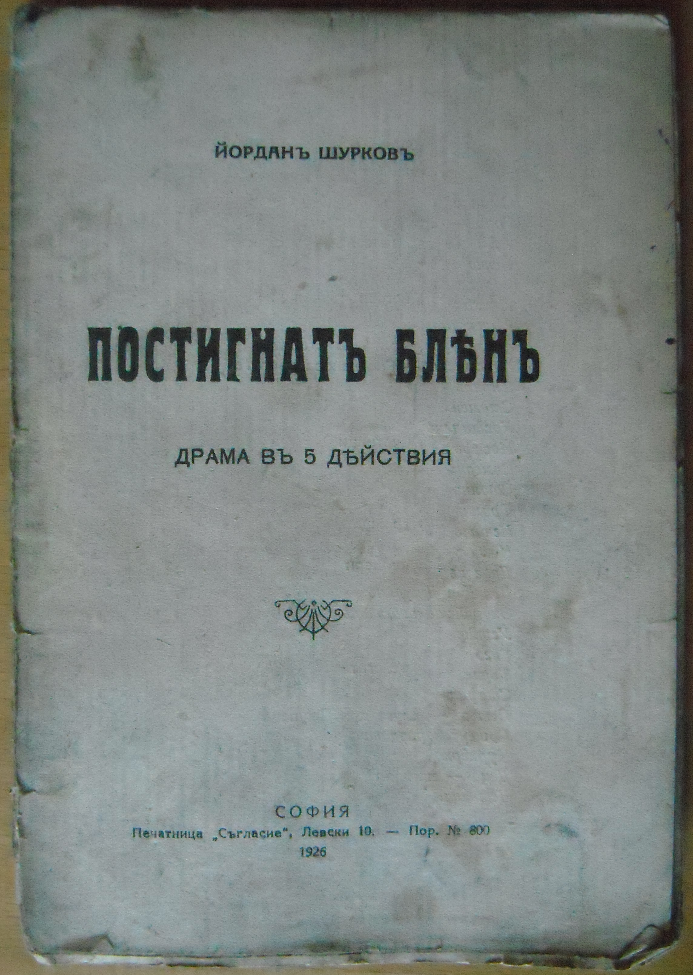 Корица на Постигнат блян на Йордан Шурков.